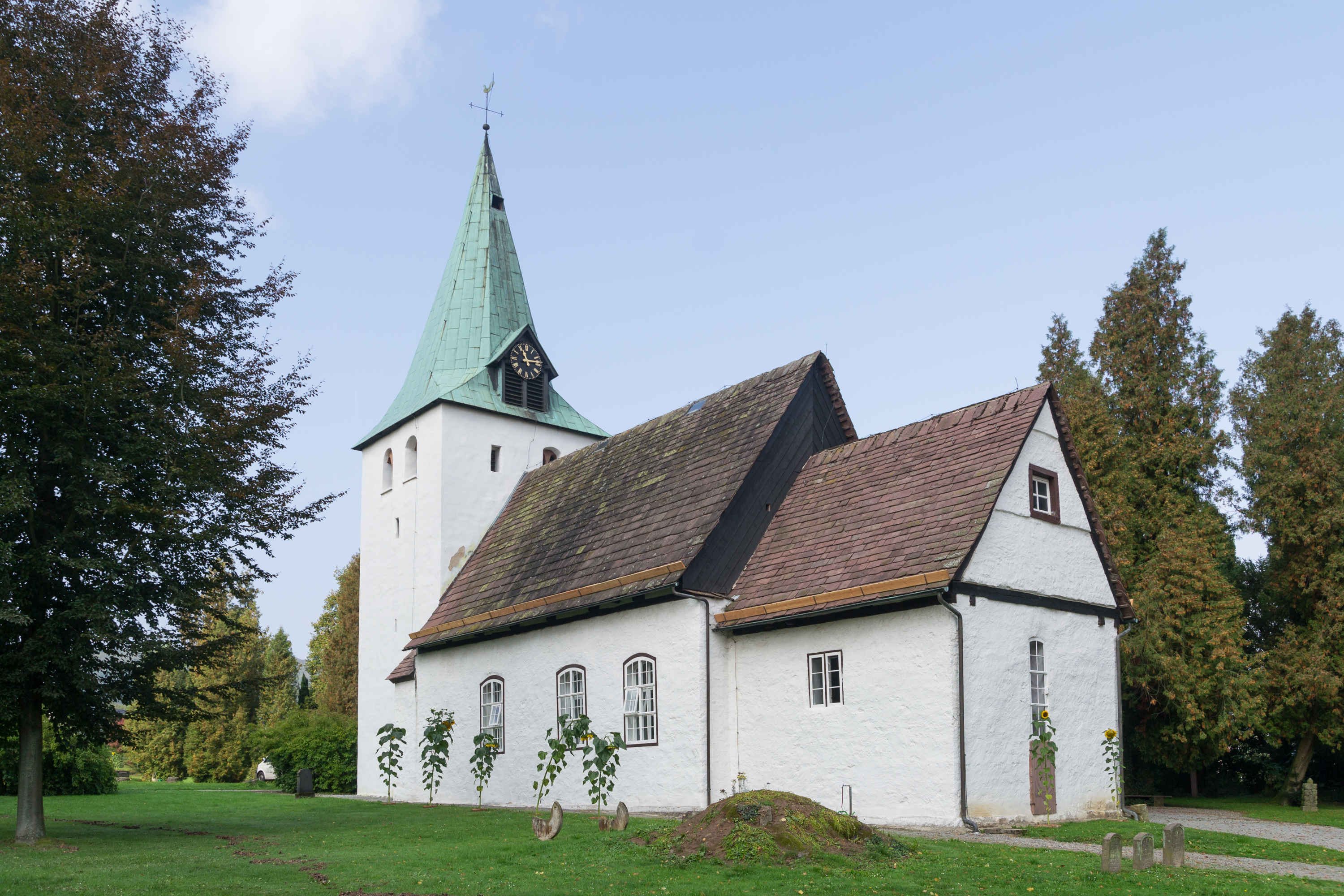 This image shows a heritage building in Germany, located in the North Rhine-Westphalian city Lügde (no. 87). Evangelische Kirche Elbrinxen